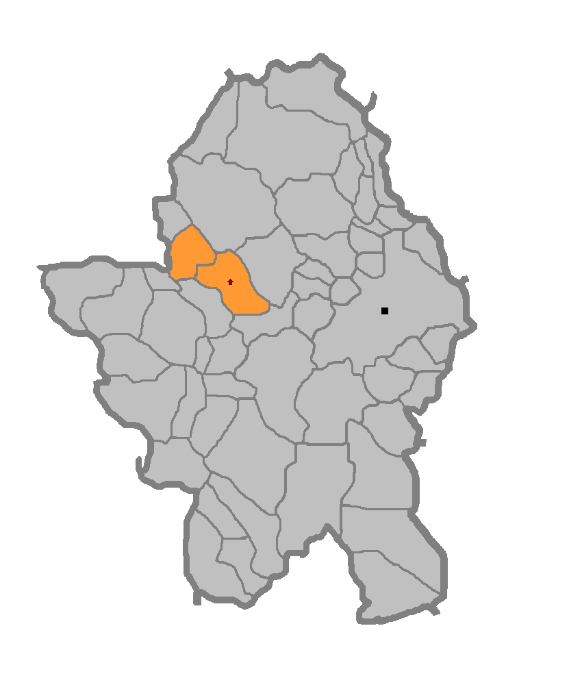 Мјесна заједница Борковићи